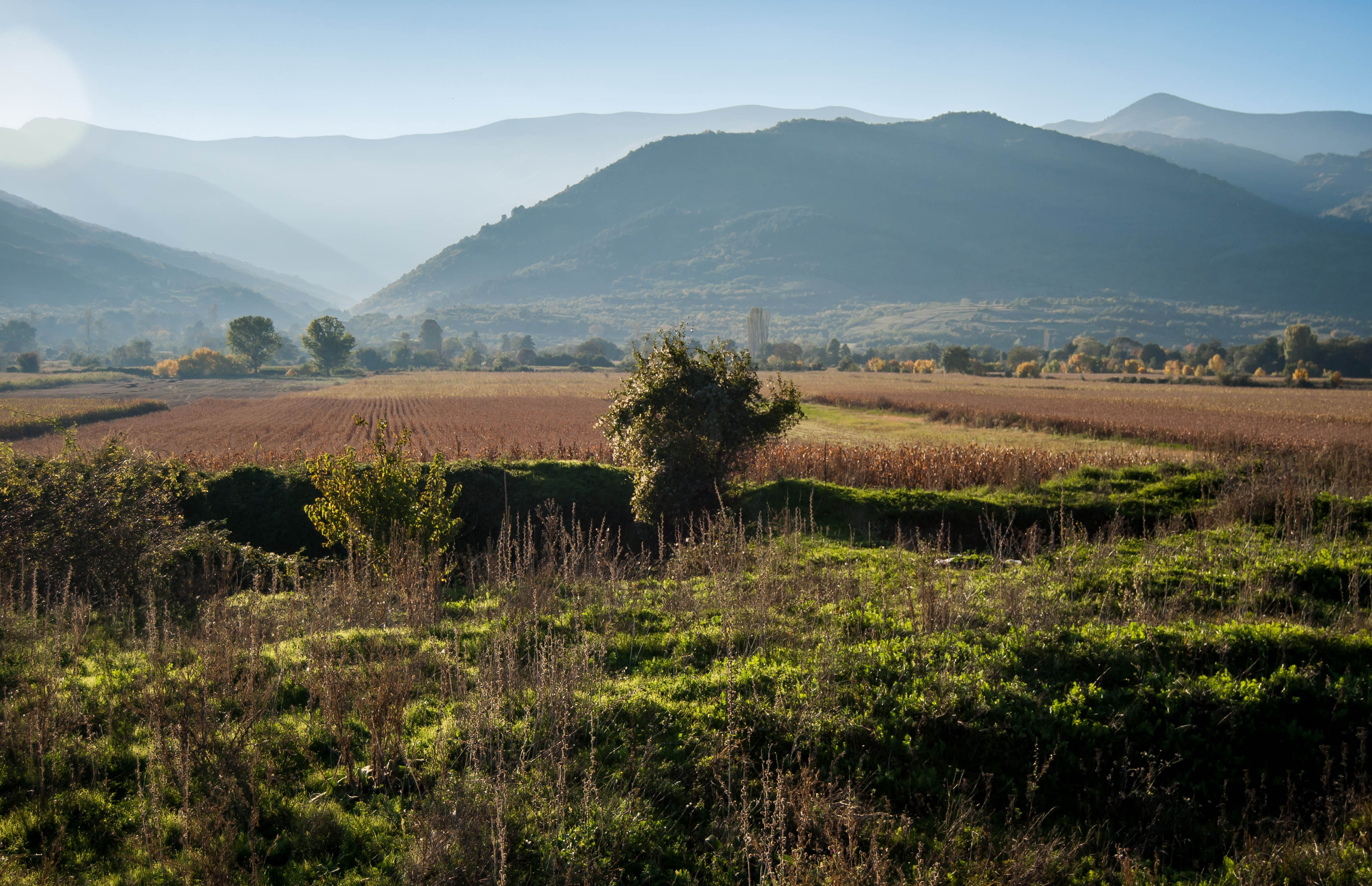 Археолошки ископини во Велушка Тумба — археолошки локалитет во близина на битолското село Велушина. Локалитетот претставува населба од неолитско време.